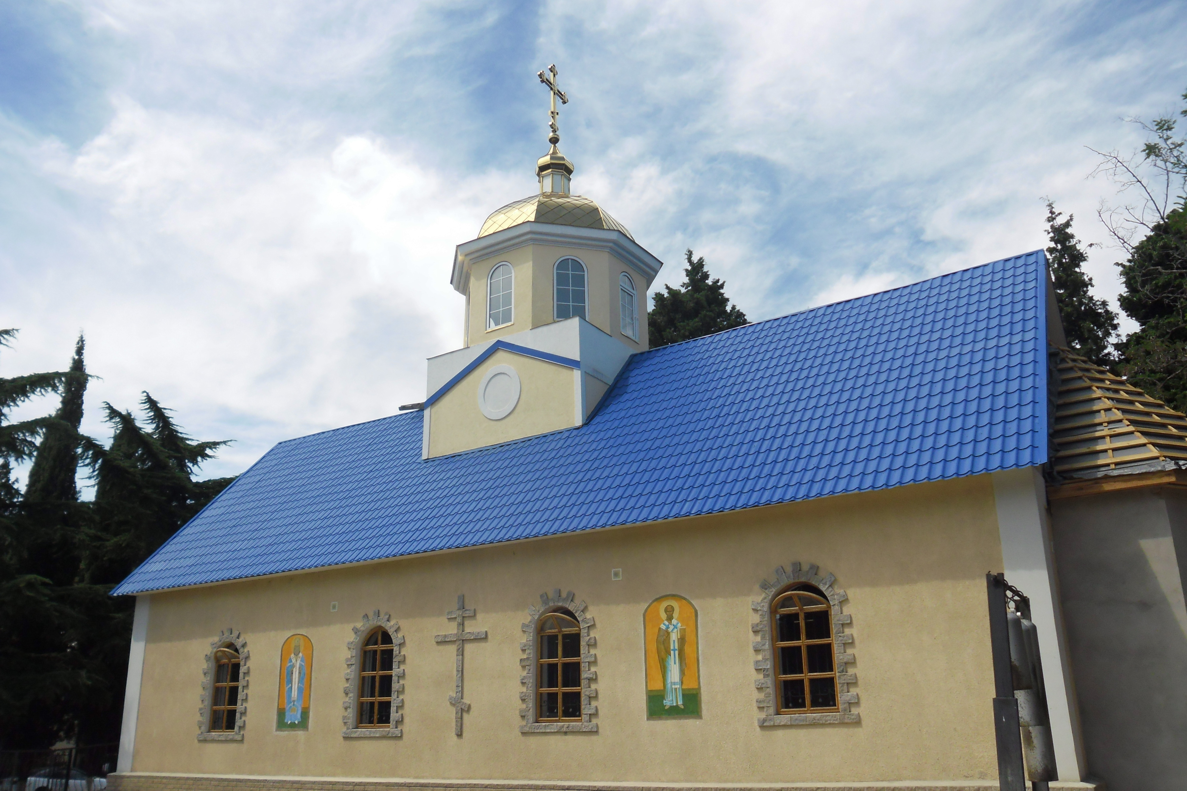 Фото